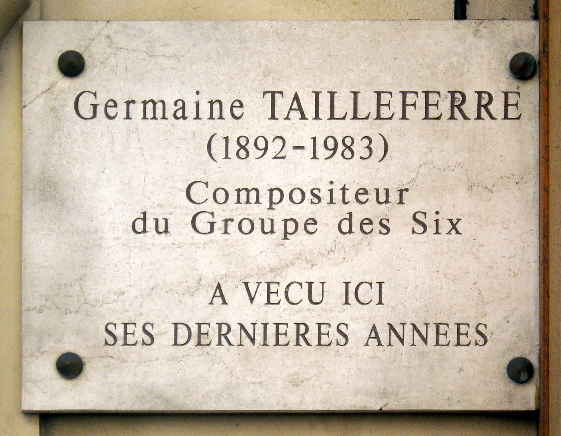 Plaque apposée au n° 87 de la rue d'Assas, Paris 6e, où la compositrice Germaine Tailleferre (1892-1983) vécut ses dernières années.